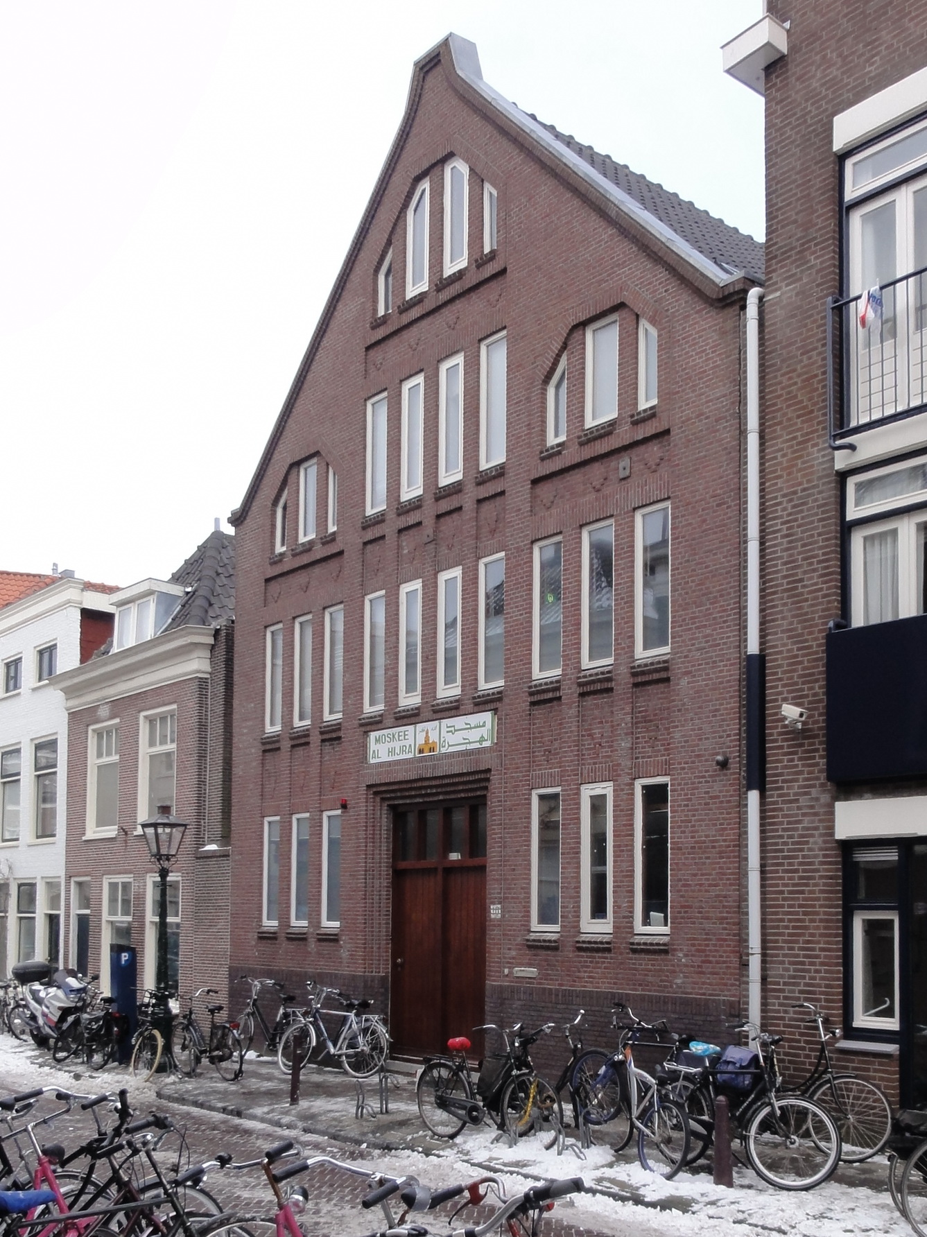 Gebouw voormalig Apostolisch Genootschap Rembrandtstraat 10 te Leiden; tussen 198X en 2016 de (oude) Al Hijra moskee